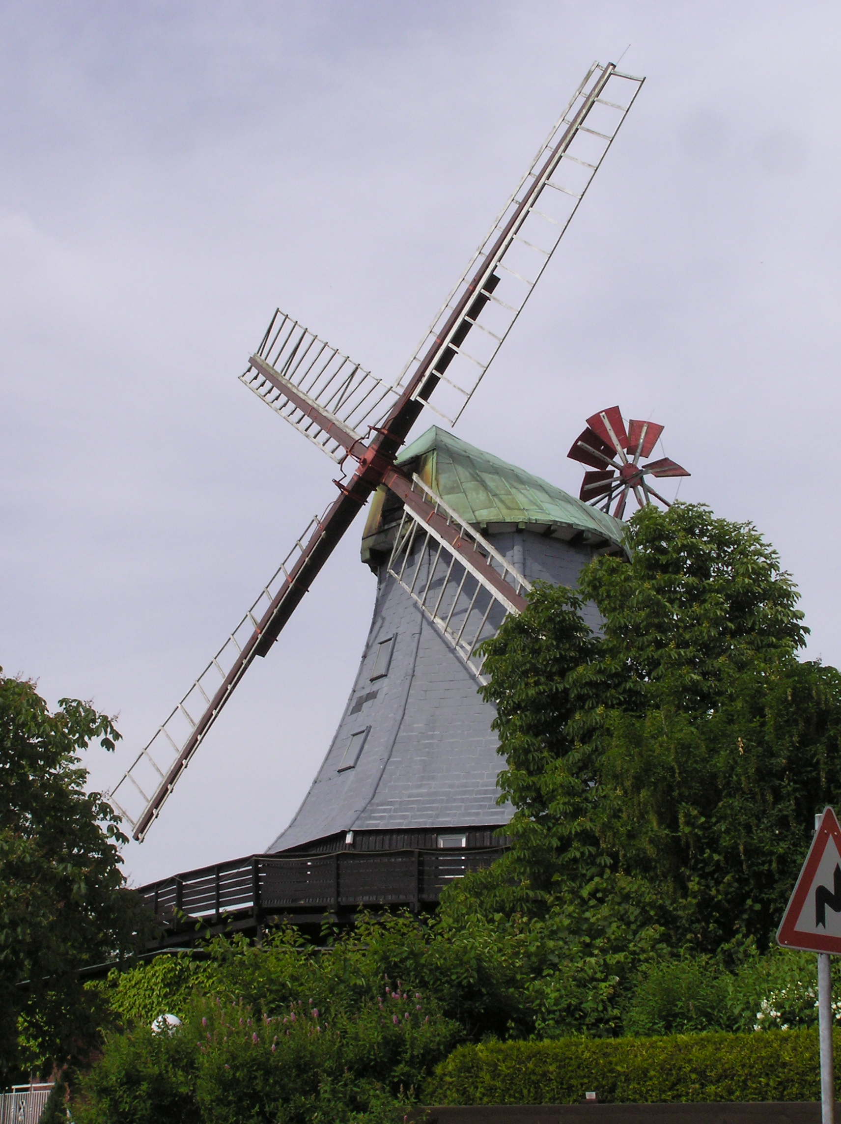 Windmill Hamfelde,SH,Germany